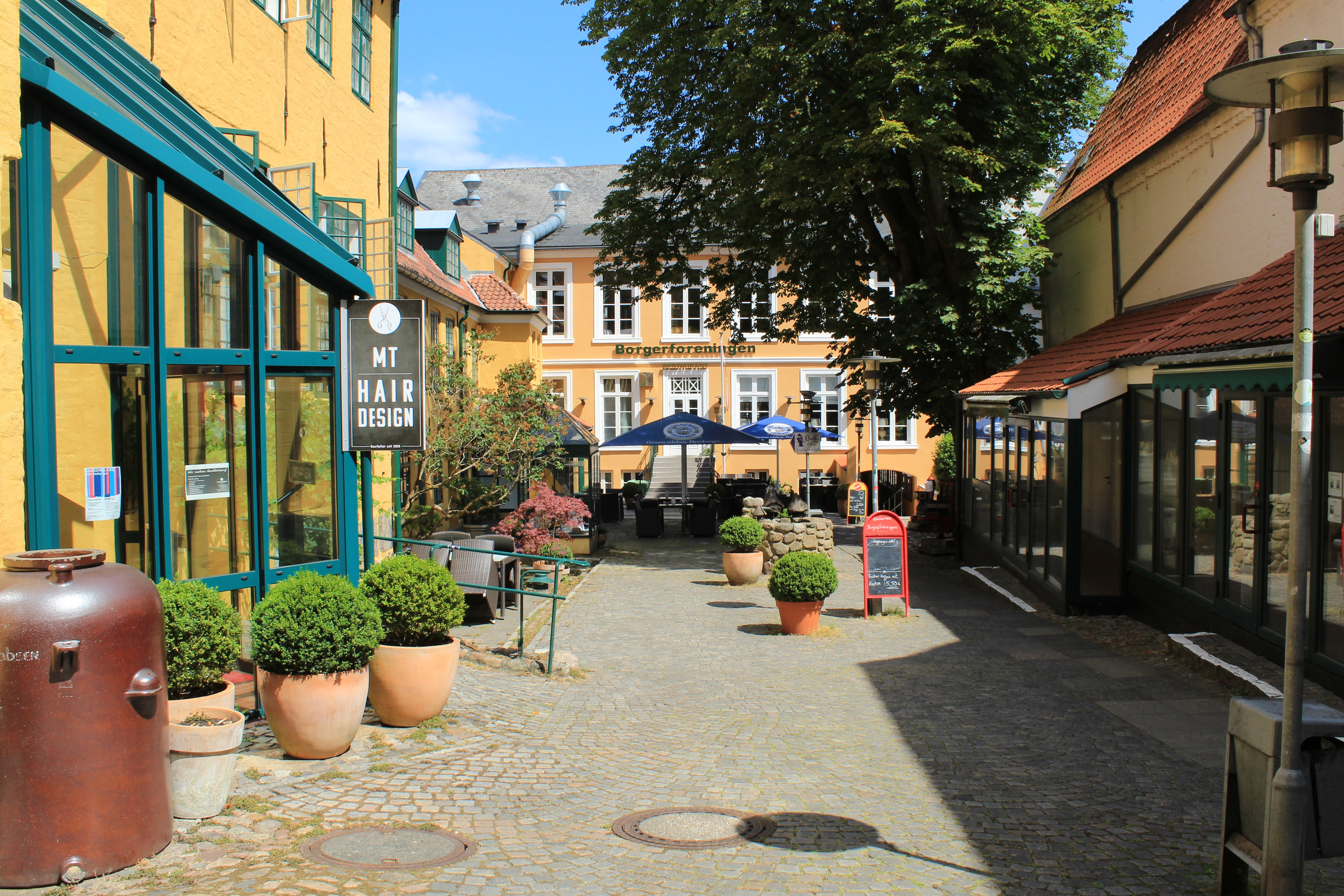 Hof Borgerforeningen im Sommer 2018